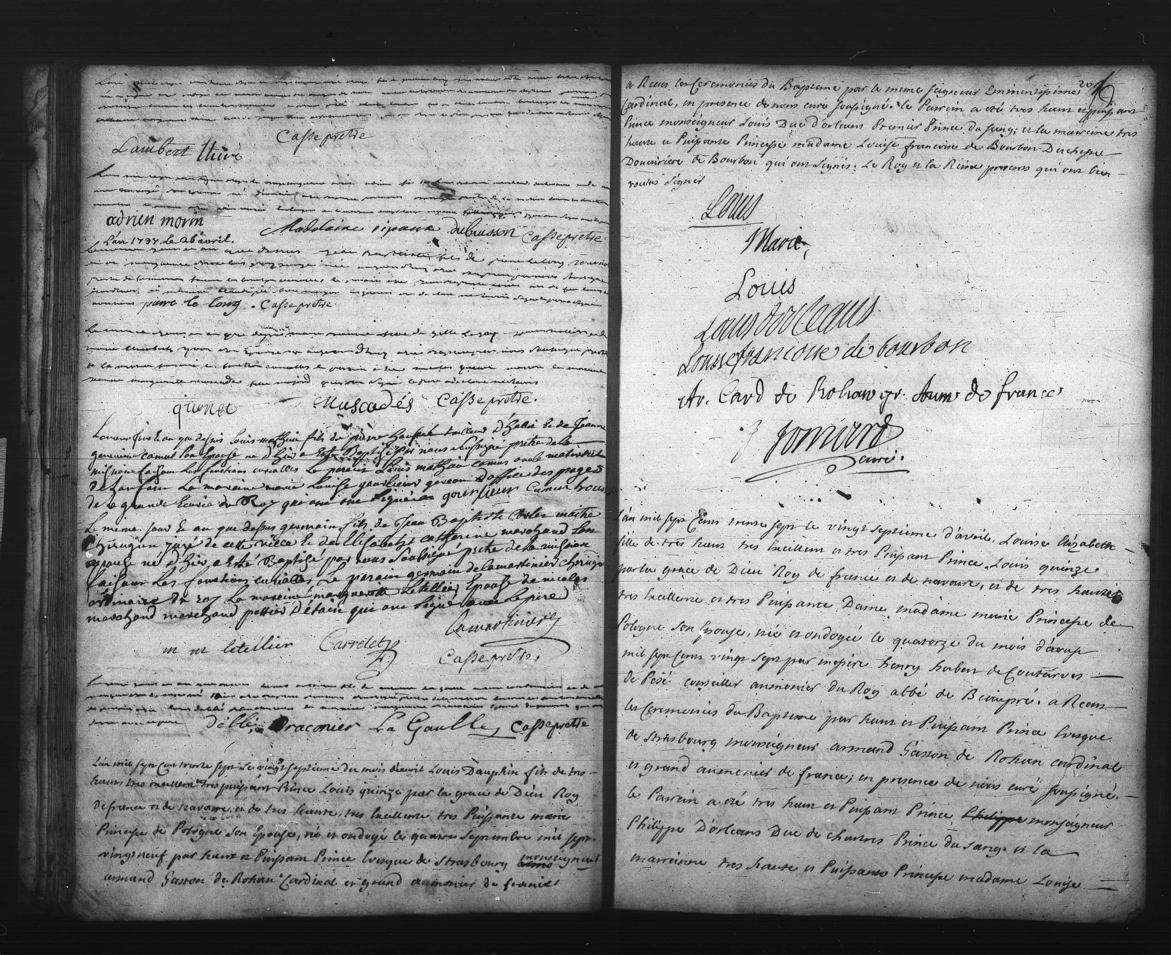 c'est son baptême !!!!